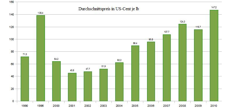 Entwicklung des durchschnittlichen Kaffeepreises in US-Cent je lb